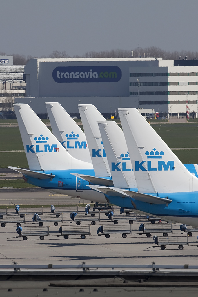 KLM 5 x tail